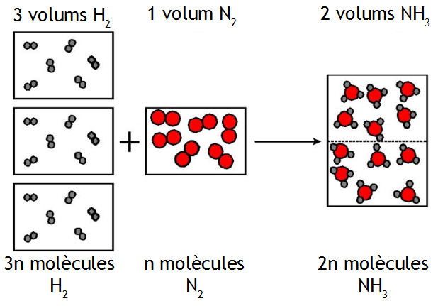 Síntesi de l'amoníac segons Avogadro